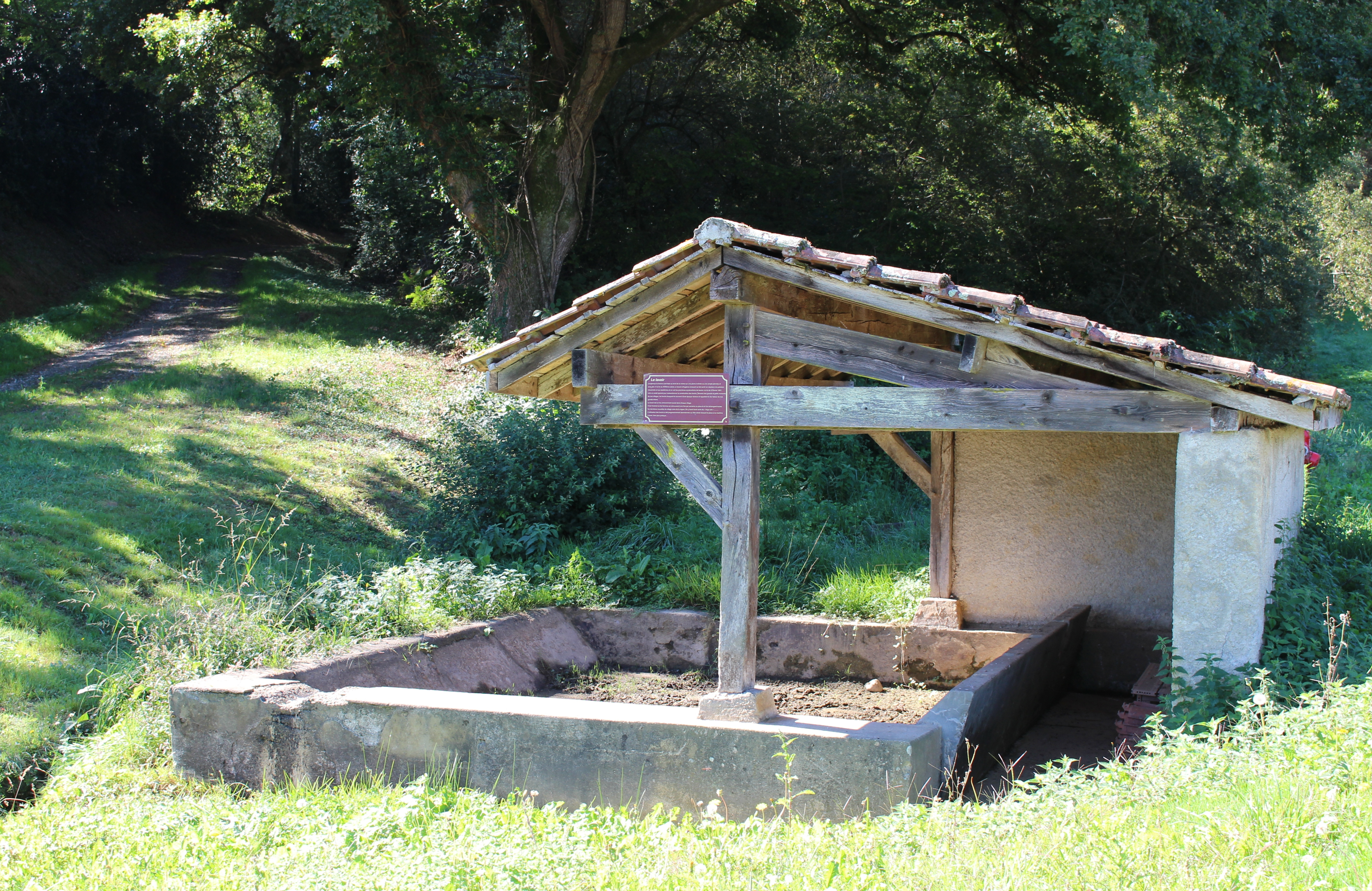 Lavoir de Sère-Rustaing (Hautes-Pyrénées)